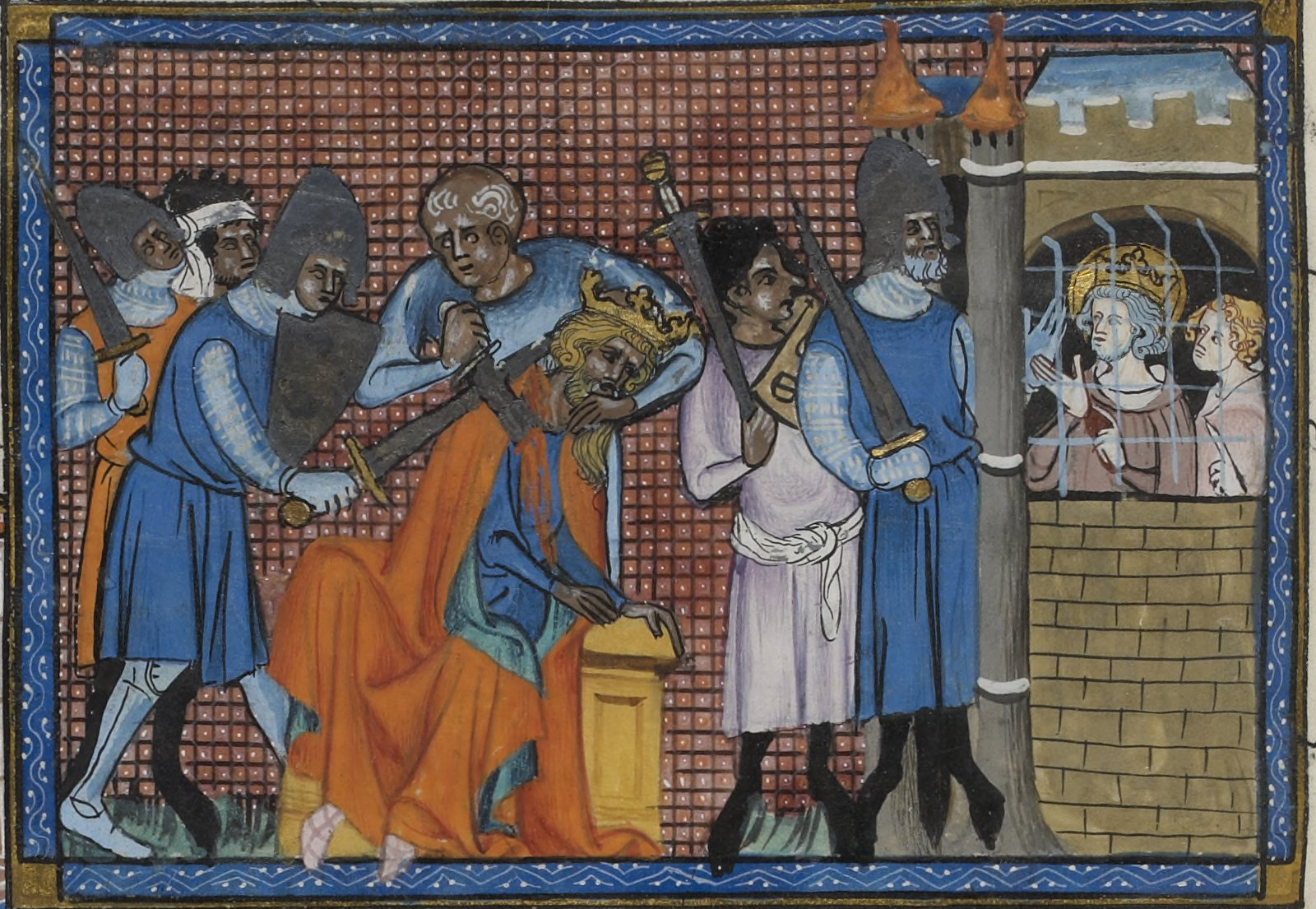 Assassinat de Tûrân Shâh. Guillaume de Saint-Pathus, Vie de Saint Louis